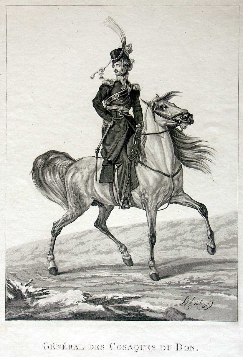 Генерал Войска Донского